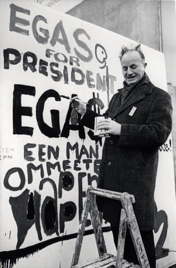 De heer C. Egas (PvdA) bij een bord tgv een zg. paint-in in Amsterdam, met als tekst o.a. "Egas for President". Nederland, 3 februari 1967.